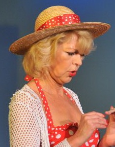 Nyertes Zsuzsa magyar színésznő.